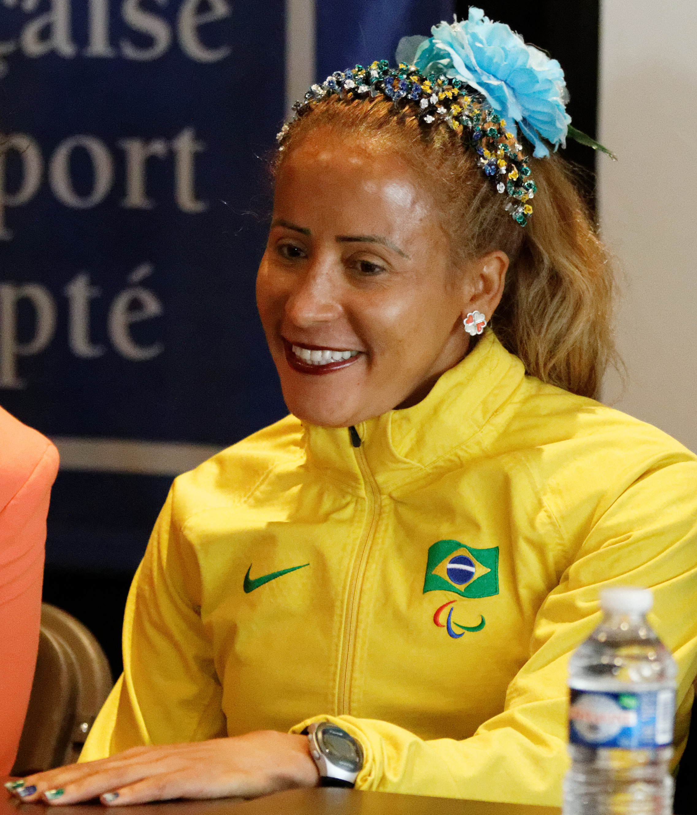 Terezinha Guilhermina lors de la conférence de presse du meeting international d'athlétisme Paris Ile-de-France, 4 juin 2014